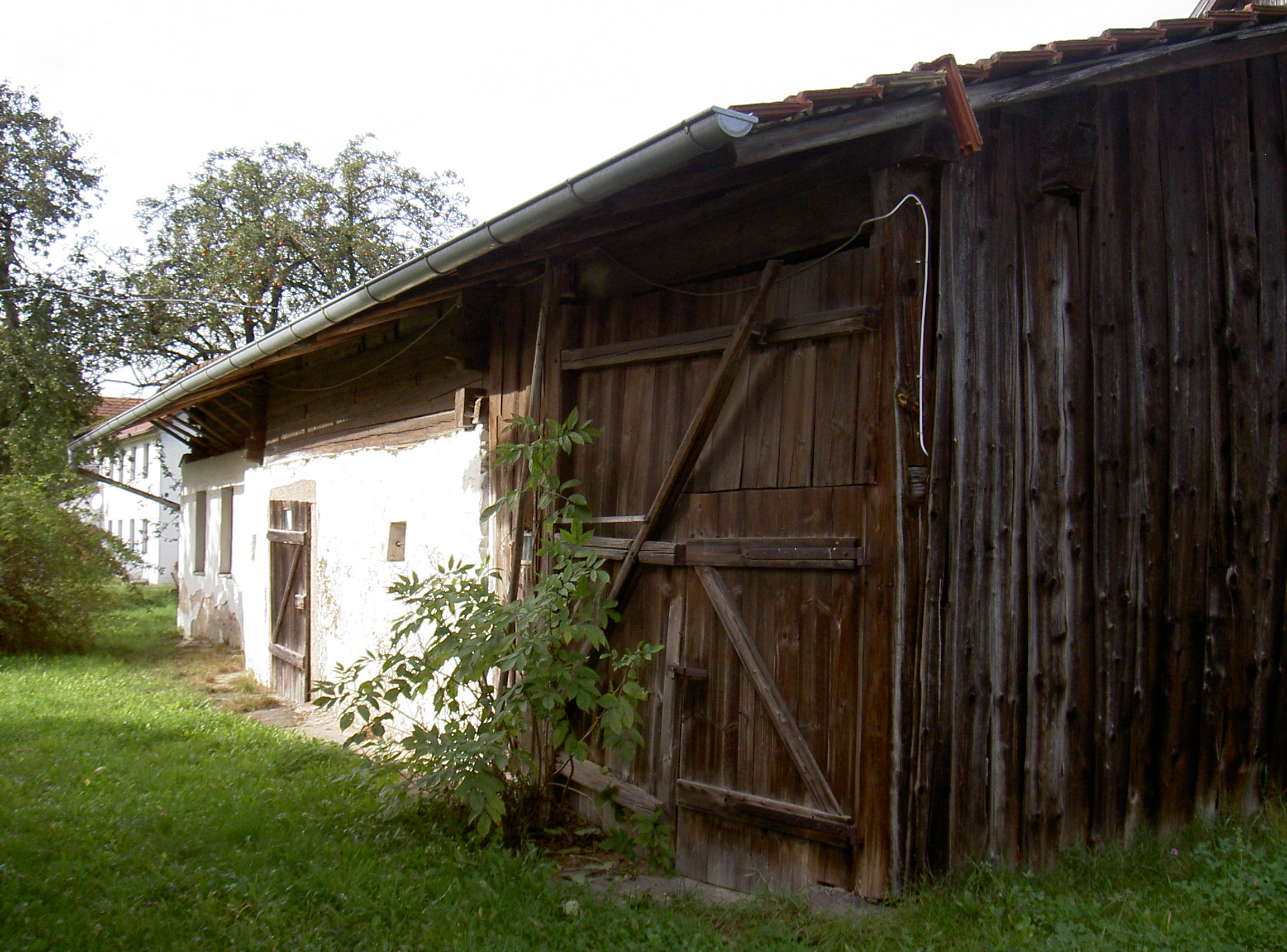 Hirschhöf Waldlerhaus